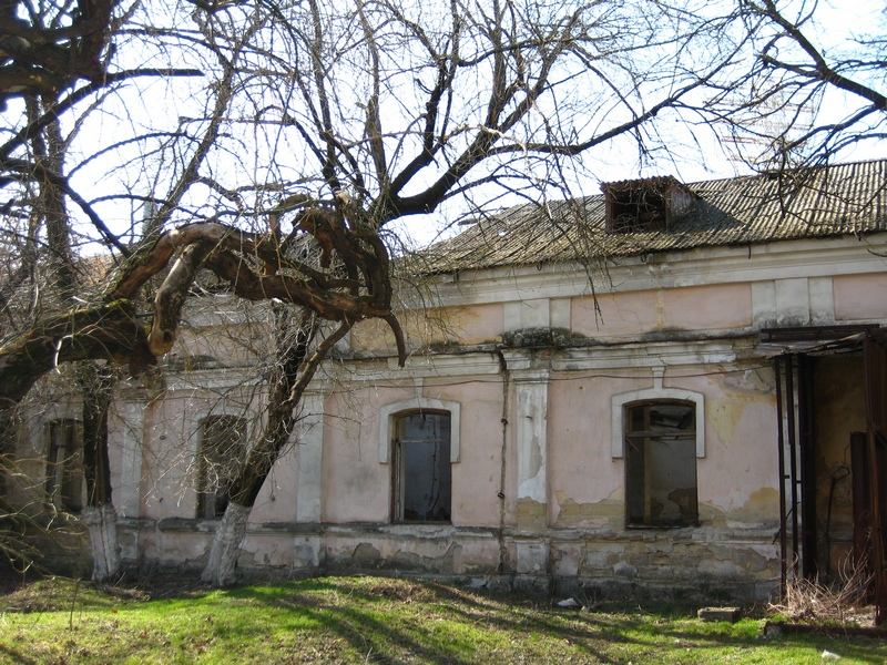 Бывшее здание Аудитории (вид сбоку)